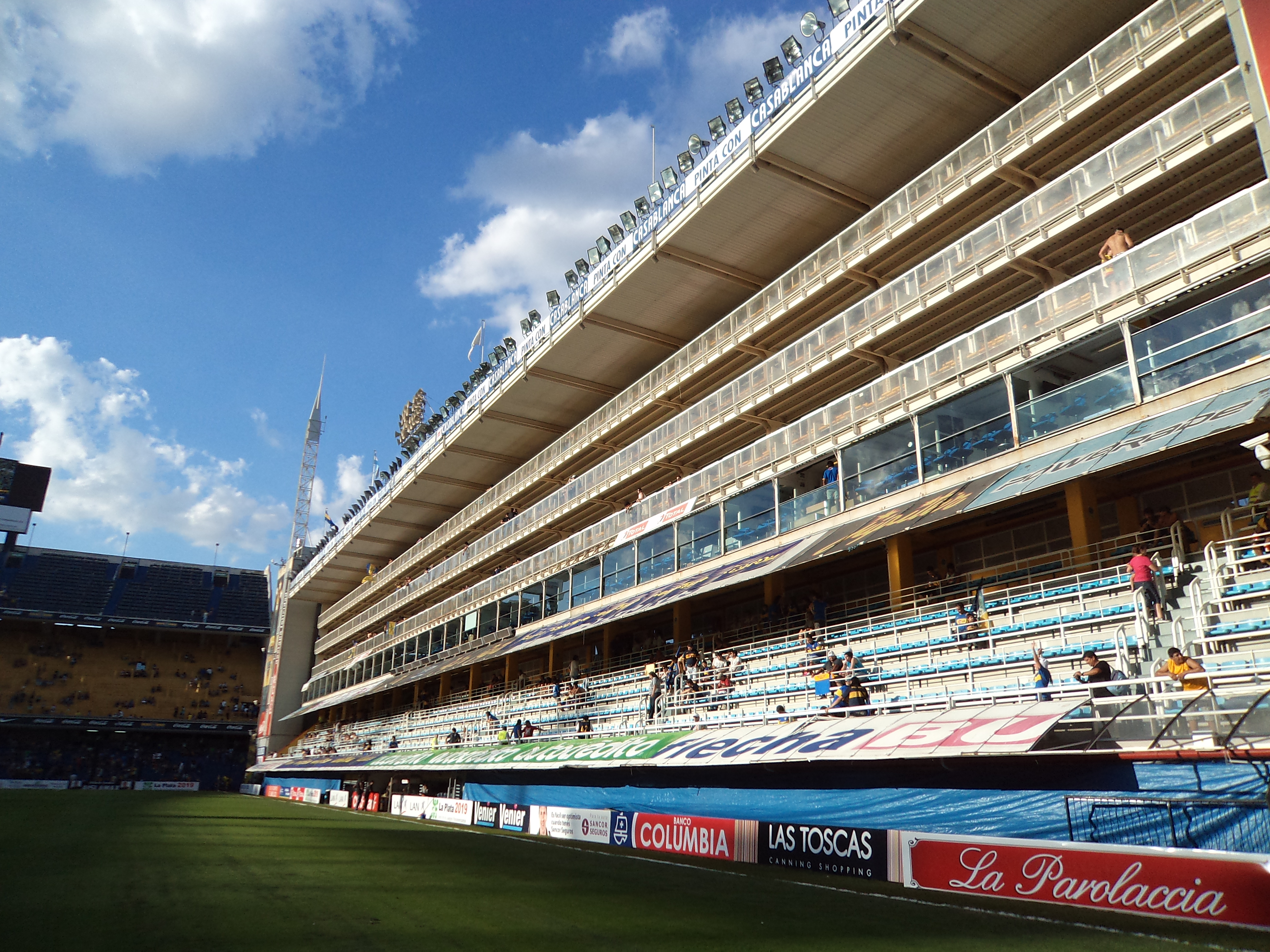 Palcos de La Bombonera